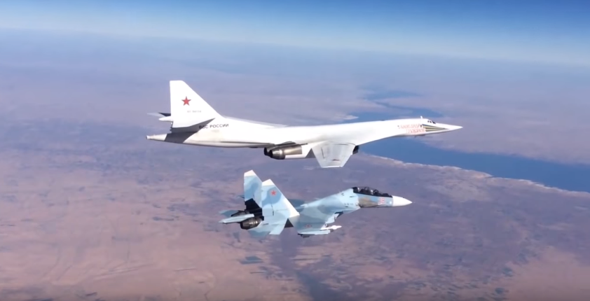 Tu-160 lançant un missile de croisière au-dessus de la méditerranée. Il est escorté par un SU-30SM.